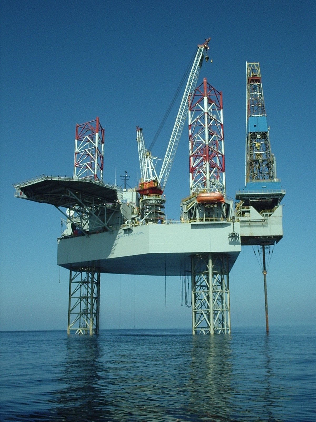 NOBLE Ronald Hoope